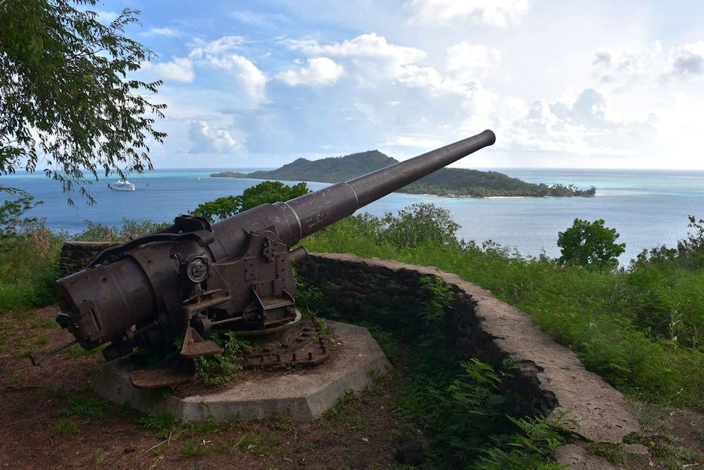 Canon installé par les troupes US pendant la seconde guerre mondiale pour protéger la passe de Bora Bora